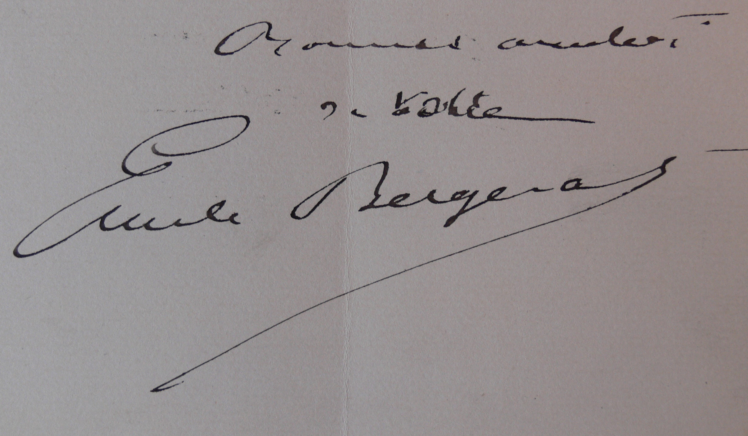 Signature d'Emile Bergerat